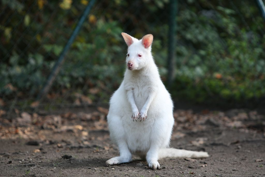 Albinokänguru im Solinger Vogelpark